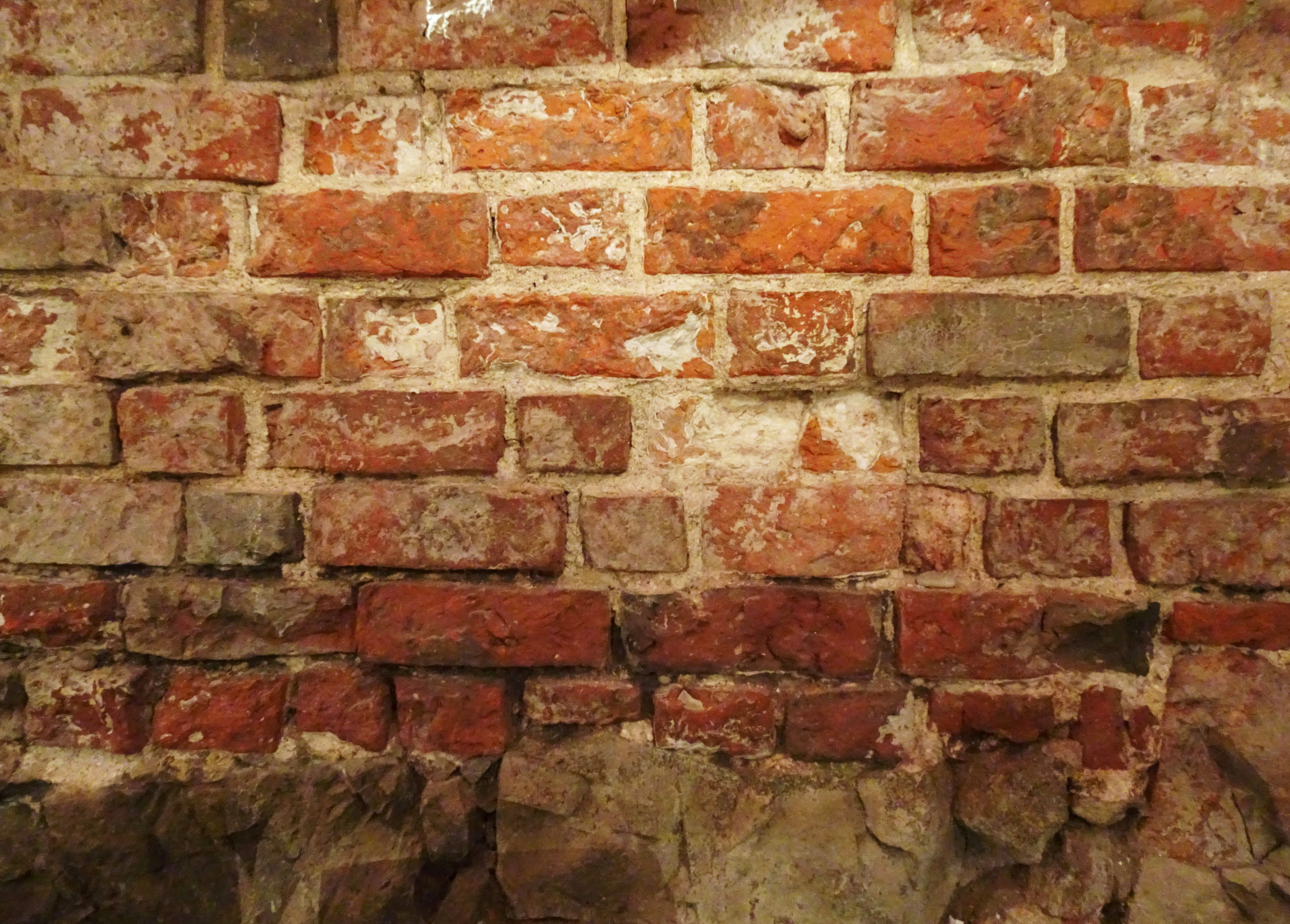 Lejontornet i Victory Hotels matsal, Lilla Nygatan 5